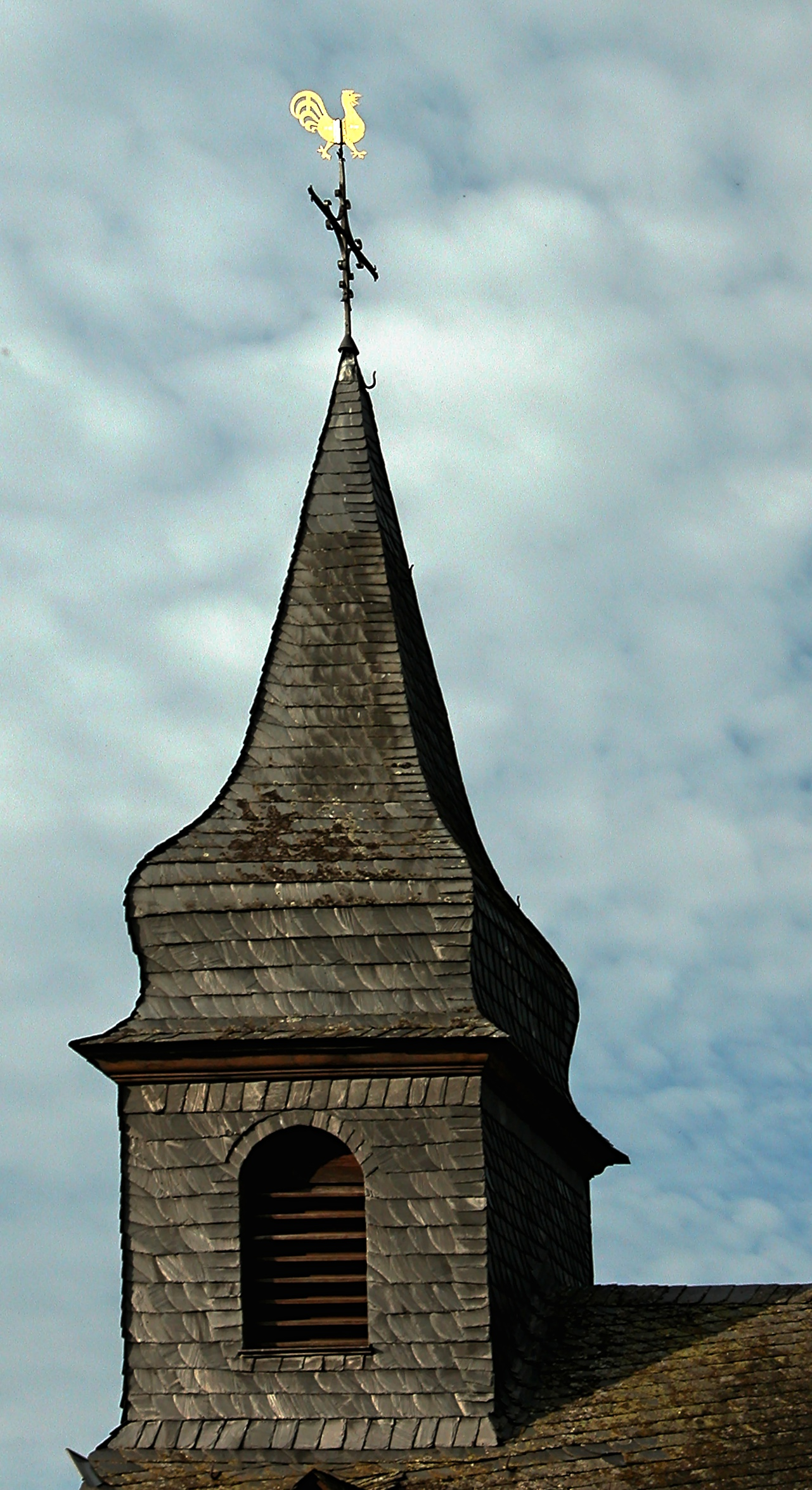 Kirchturm und Wetterhahn der Kirche "Zum Heiligen Kreuz" in Heckenmünster (Eifel)